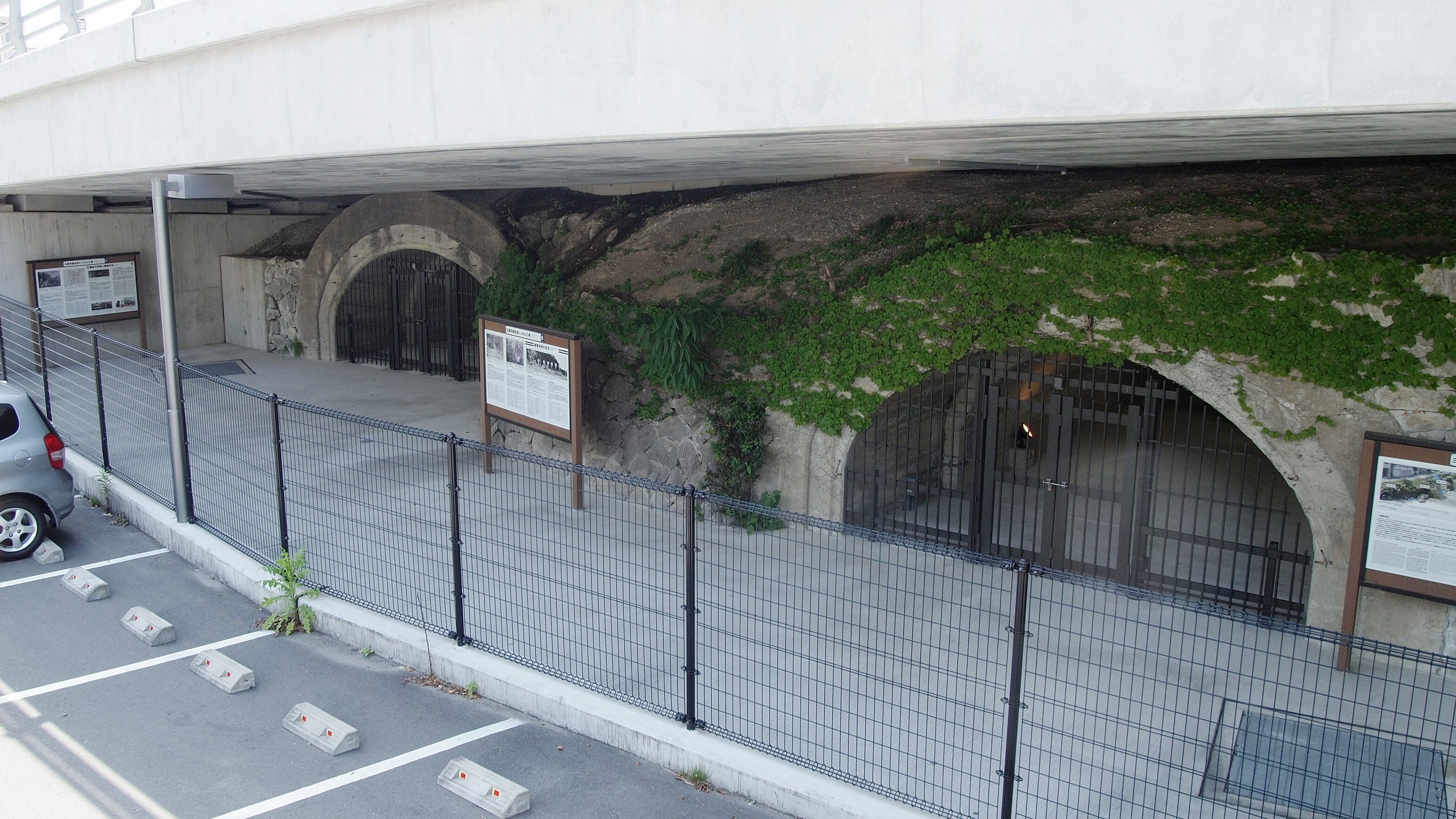 三菱兵器住吉トンネル工場跡（長崎県長崎市）の施設外観。道路の下部に位置していることがわかる。